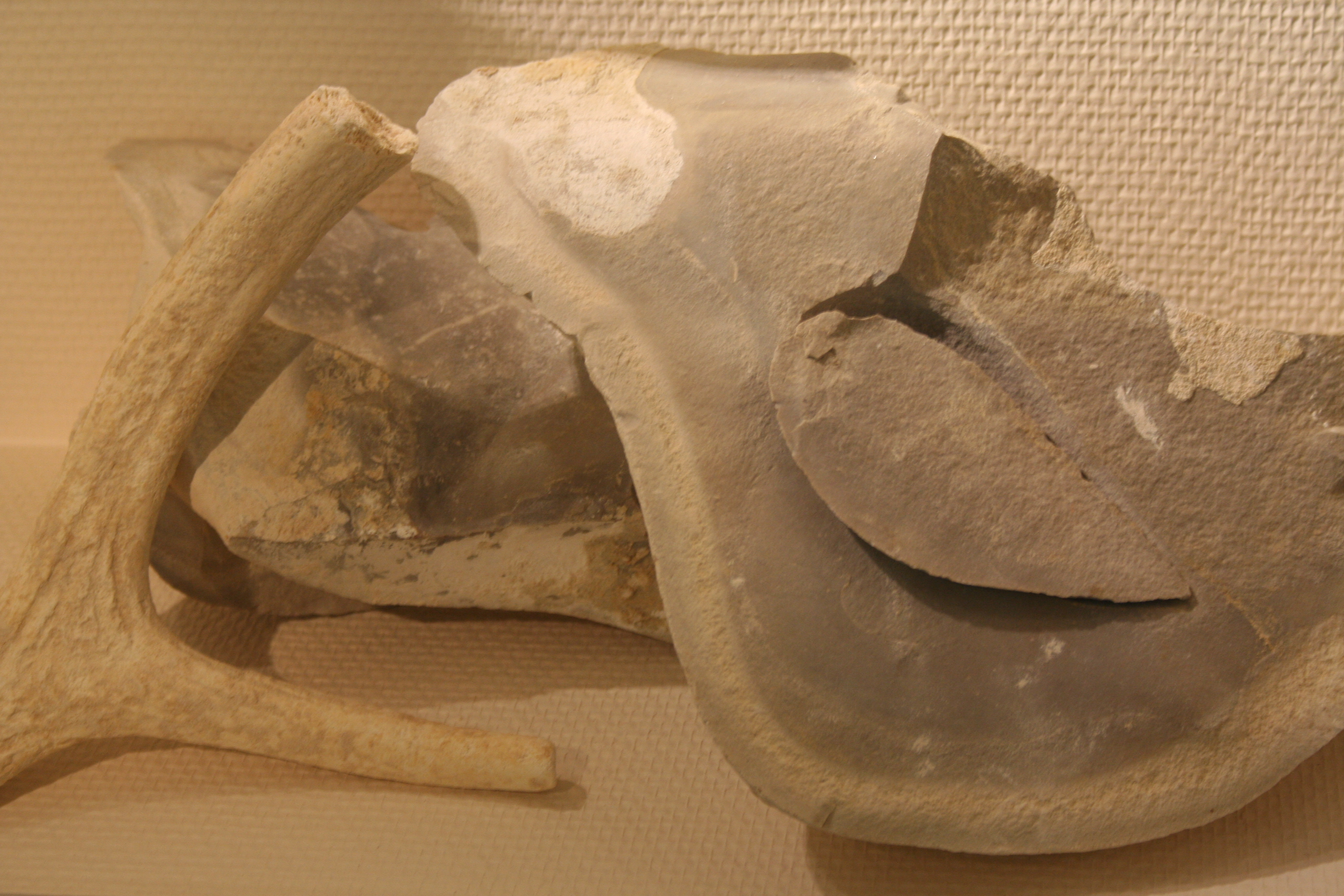 éléments de production de silex